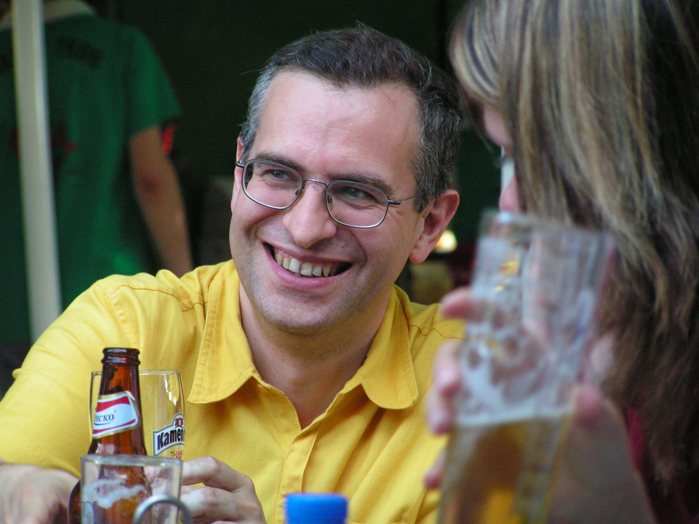 Carlo Lottieri, Italian libertarian